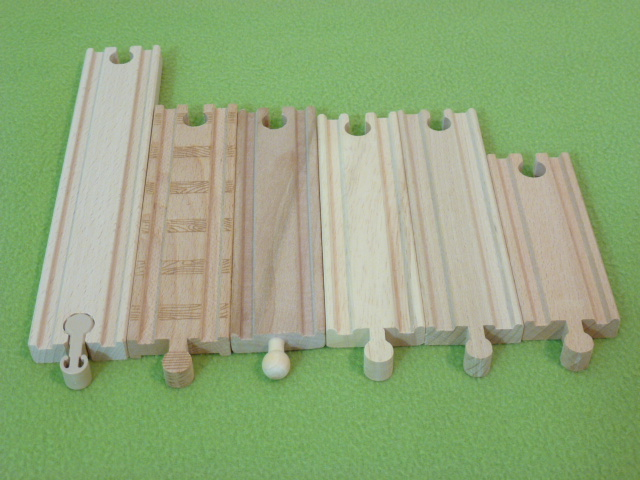 Porównanie torów drewnianych wszystkich producentów dostępnych w Polsce